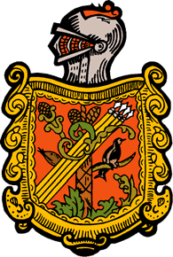 Escudo del concejos asturiano de Grado (España).